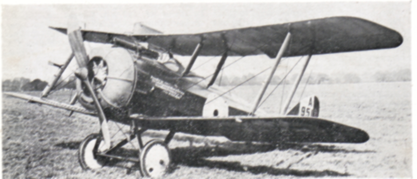 Airco D.H.5